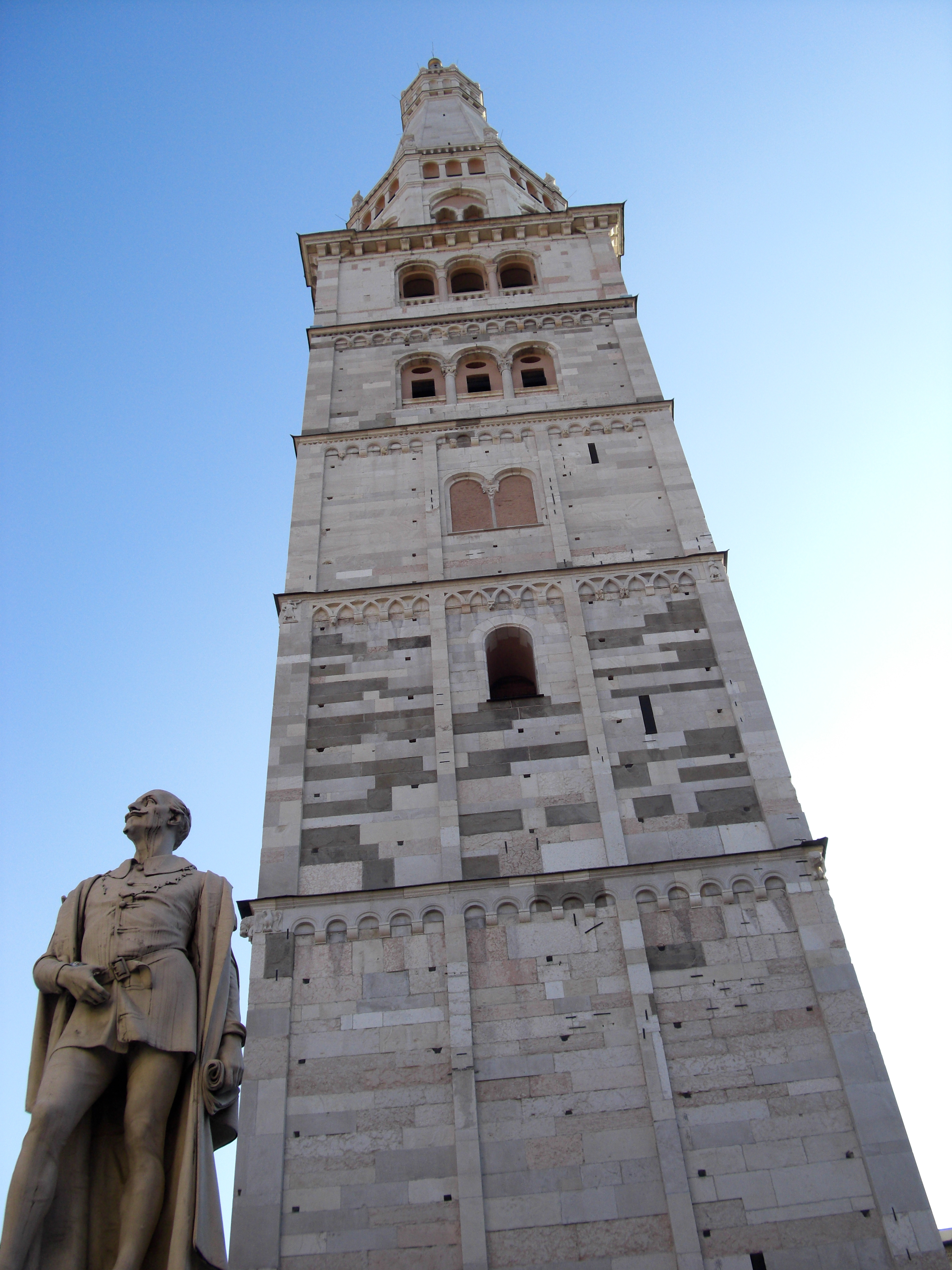 Torre Ghirlandina This is a photo of a monument which is part of cultural heritage of Italy.